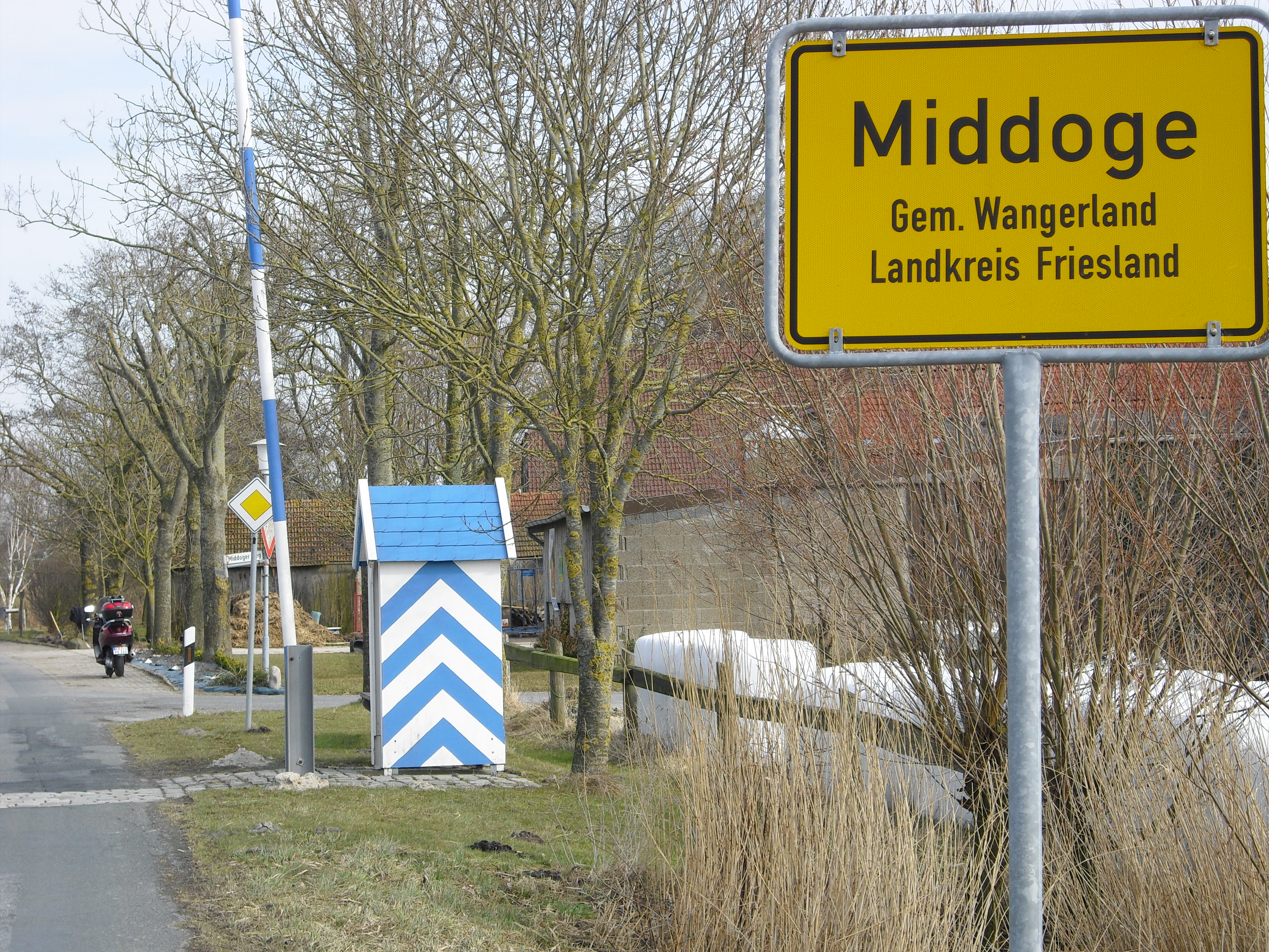 "Grenzübergang" Friesland - Ostfriesland (Ortseingang Middoge)